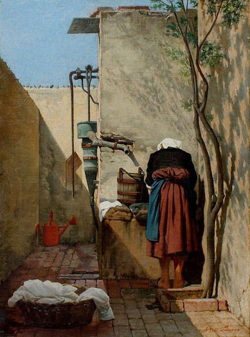 "La lavandaia", olio su tela, 67 x 47 cm., firmato, coll. privata